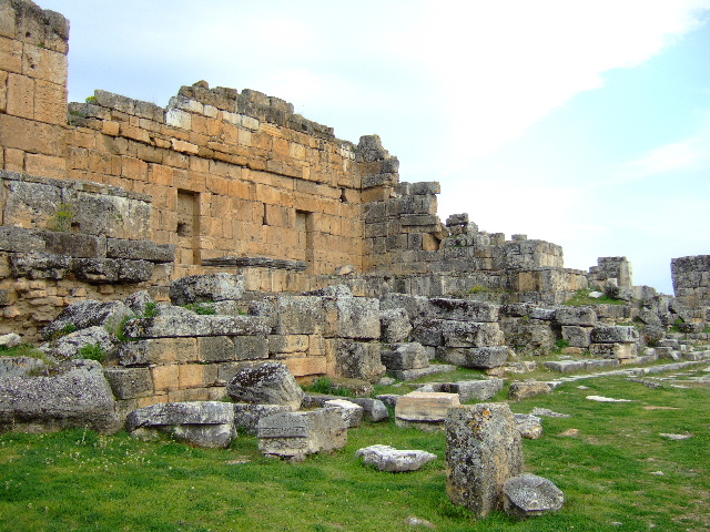 Hierapolis: Nymphaeum